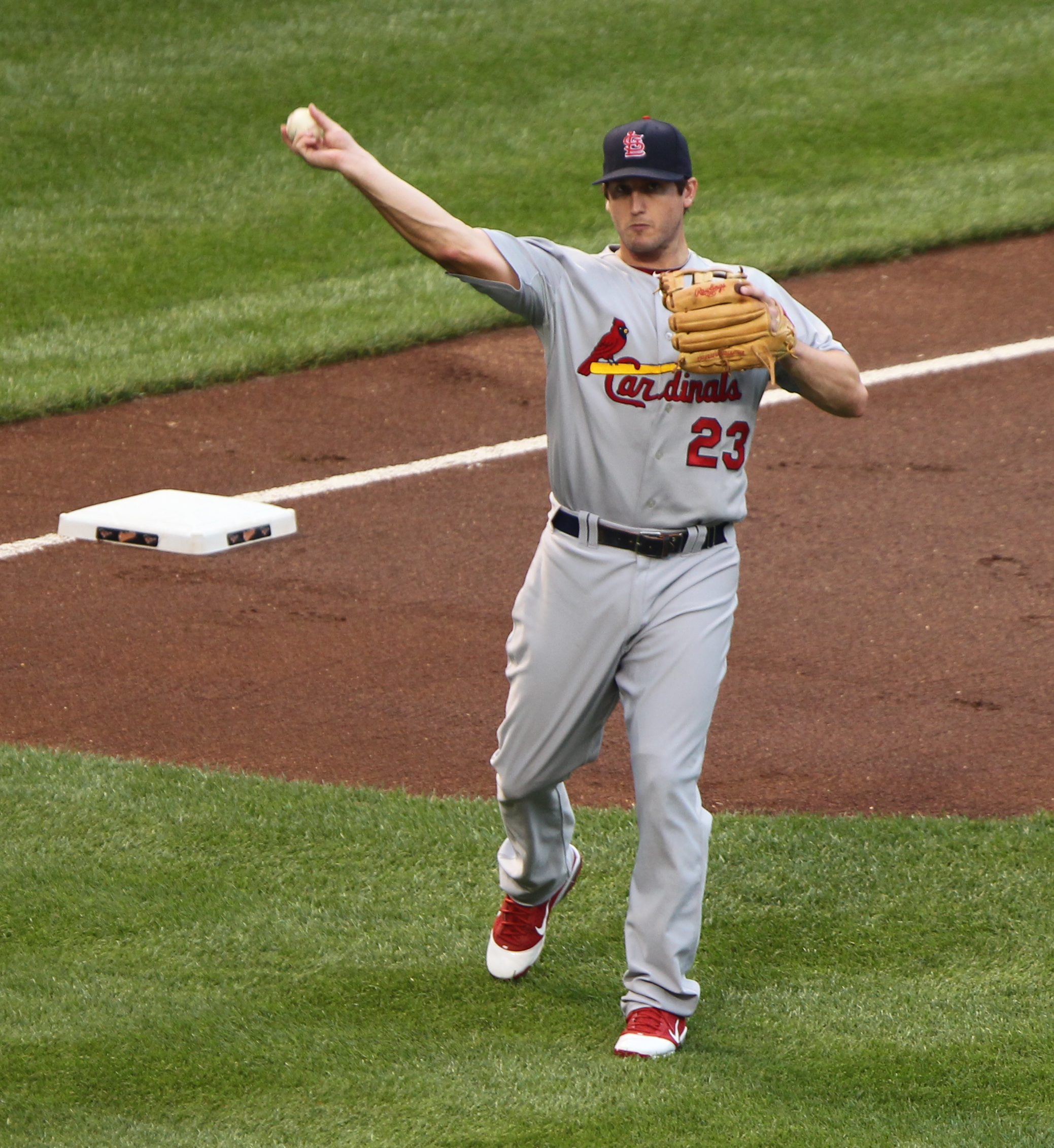 Cardinals at Orioles June 28, 2011